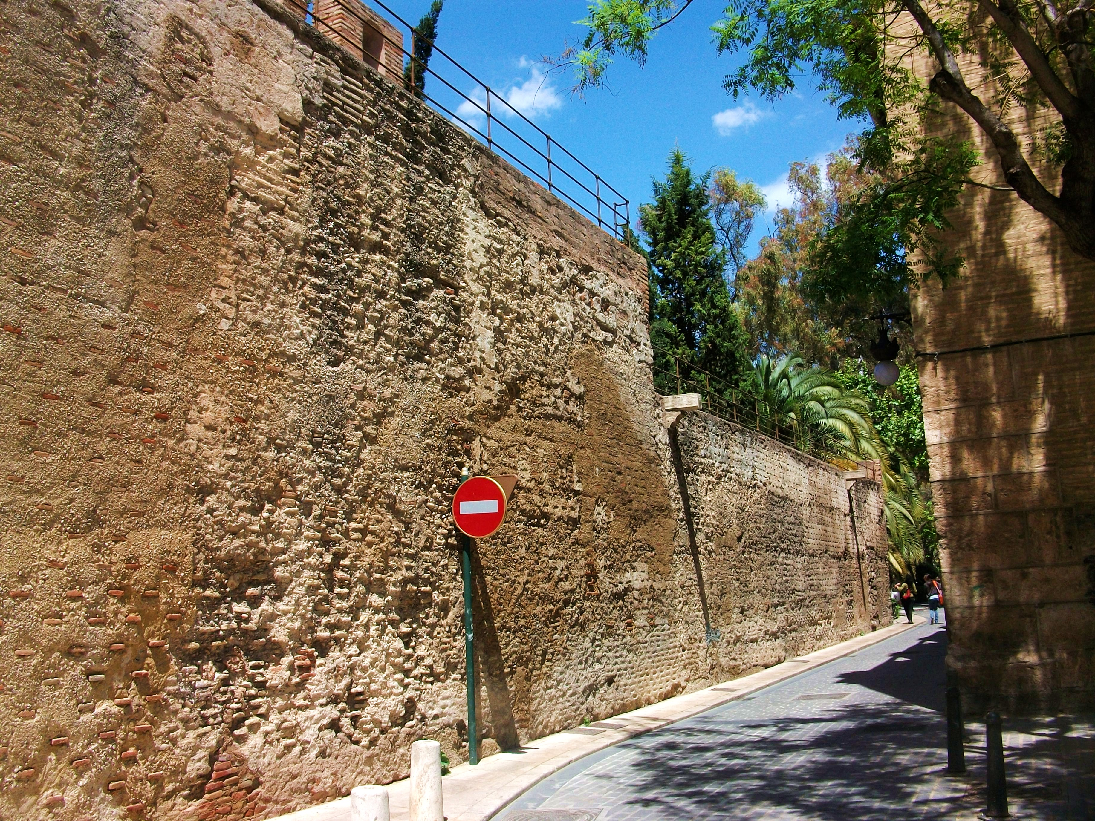 Restes de la muralla cristiana de València al costat de les Torres de Quart.